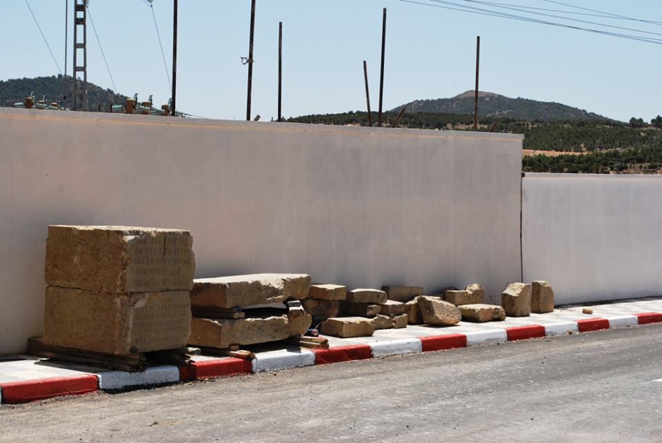 L'état de la pierre inaugurale en 2013, a l'entrée de la nouvelle agence routière.